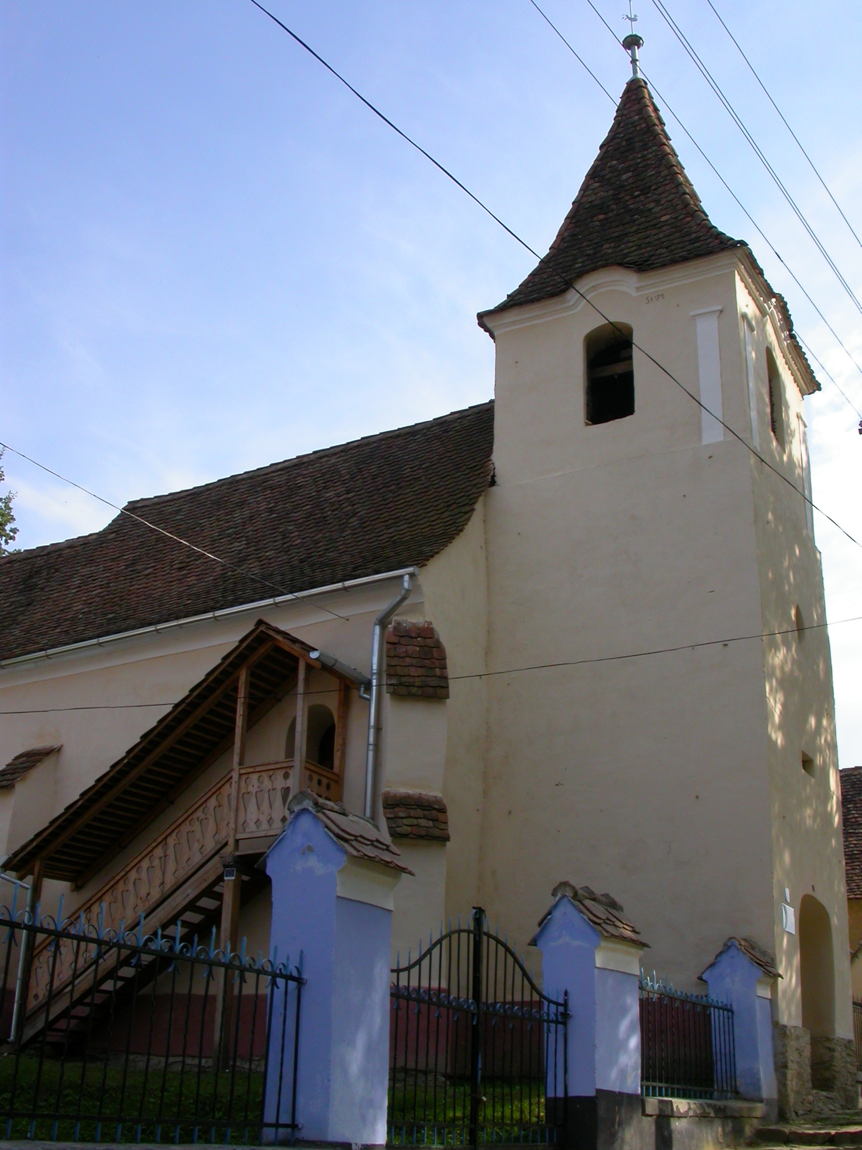 Biserica evanghelică, 1424 (biserica), 1835 (turn)